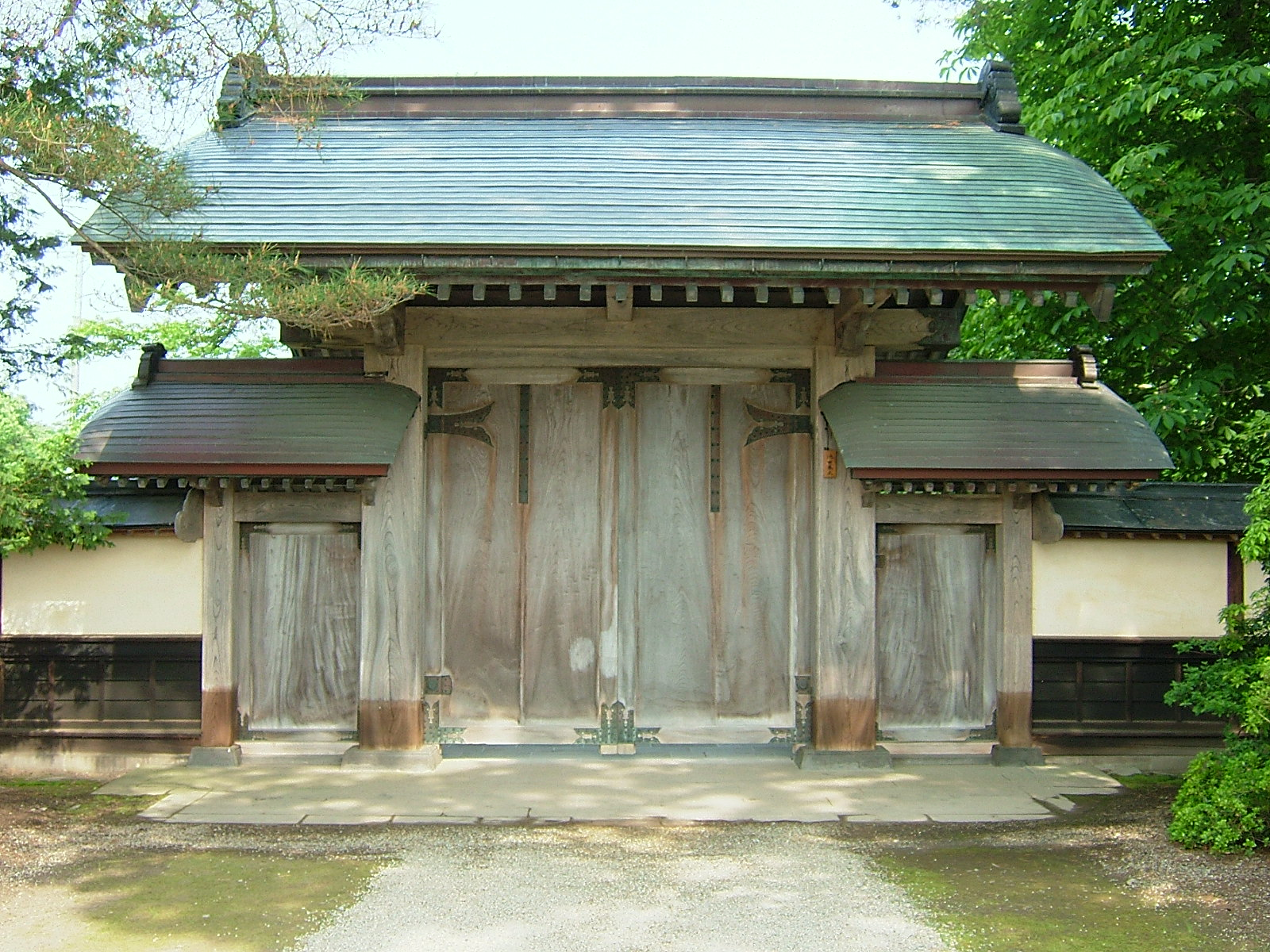 旧池田氏庭園正門